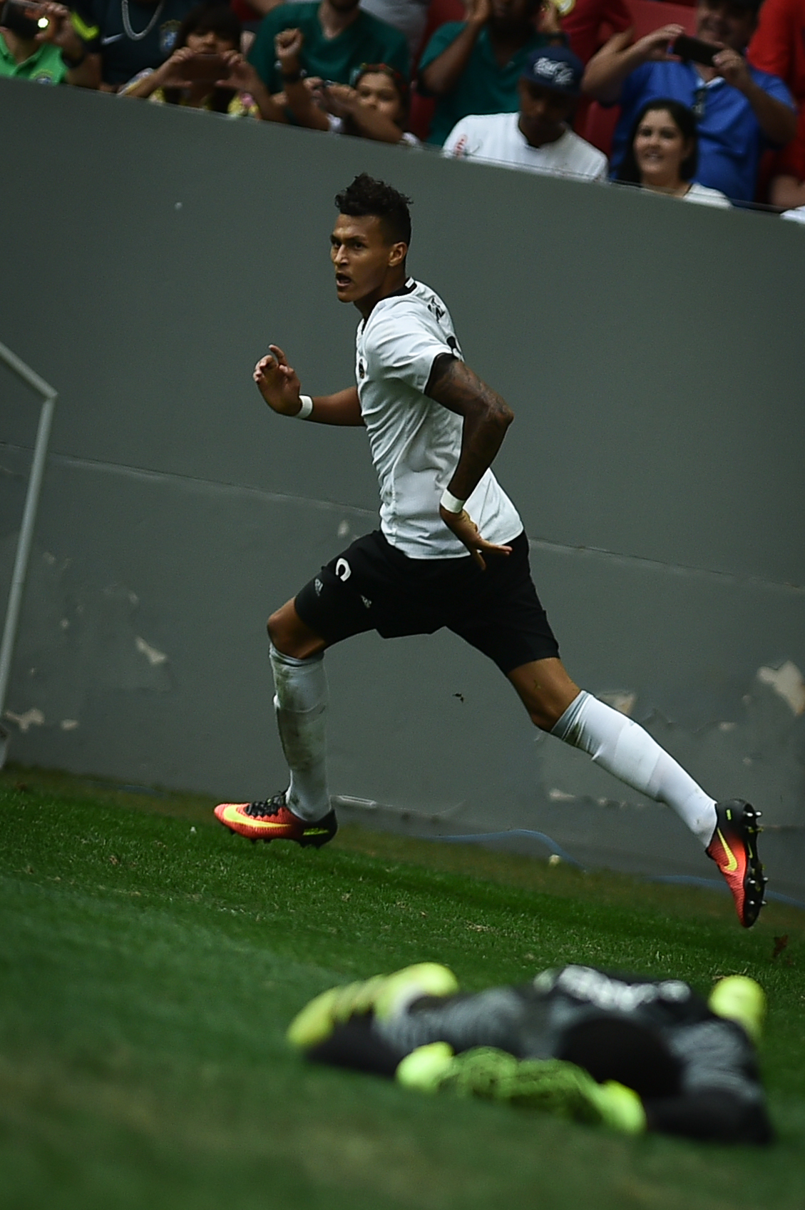 Estádio Nacional de Brasília Mané Garrincha, Brasília, DF, Brasil, 13/8/2016 Foto: Andre Borges/Agência Brasília Portigal e Alemanha jogam neste sábado (12), no Estádio Mané Garrincha, pelas quartas de final do futebol masculino nas Olimpíadas 2016.